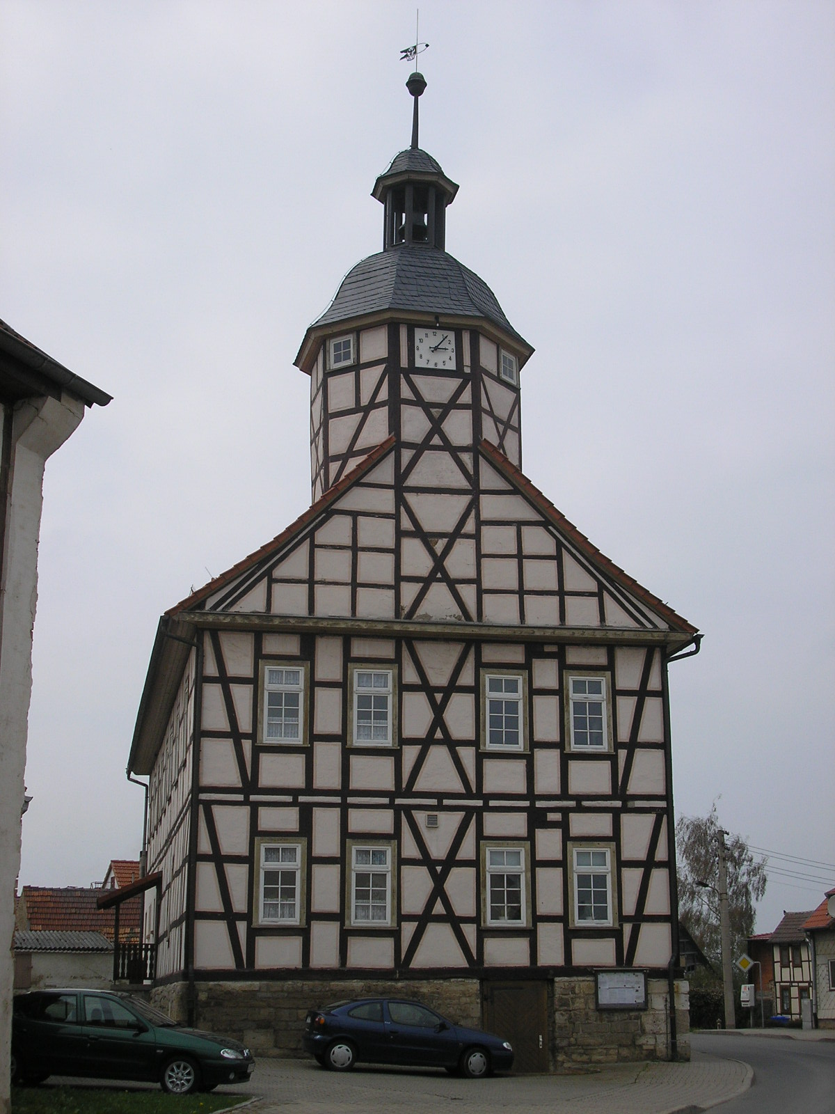 Das Rathaus von Großenehrich (Thüringen).